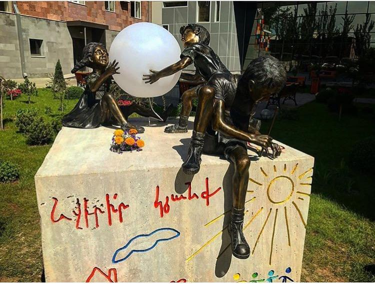 Մանկություն, հեղինակ` Նուռ